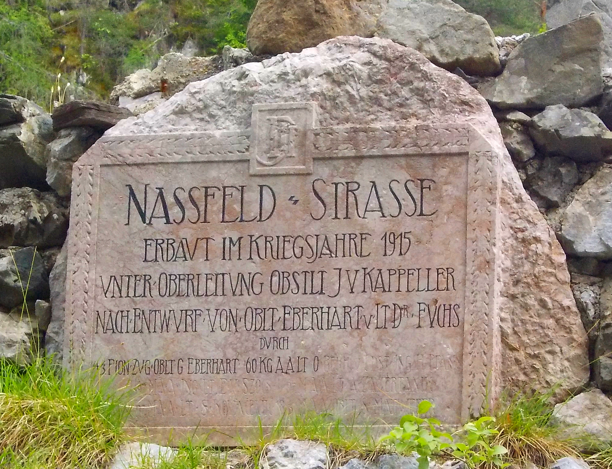 Gedenktafel zum AUsbau des Nassfeldpasses (Kärnten) 1915